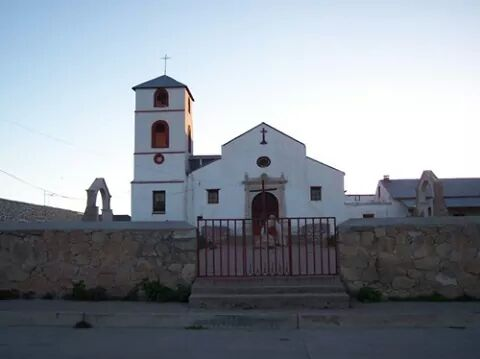 Iglesia de carichi, datando del siglo XVIII